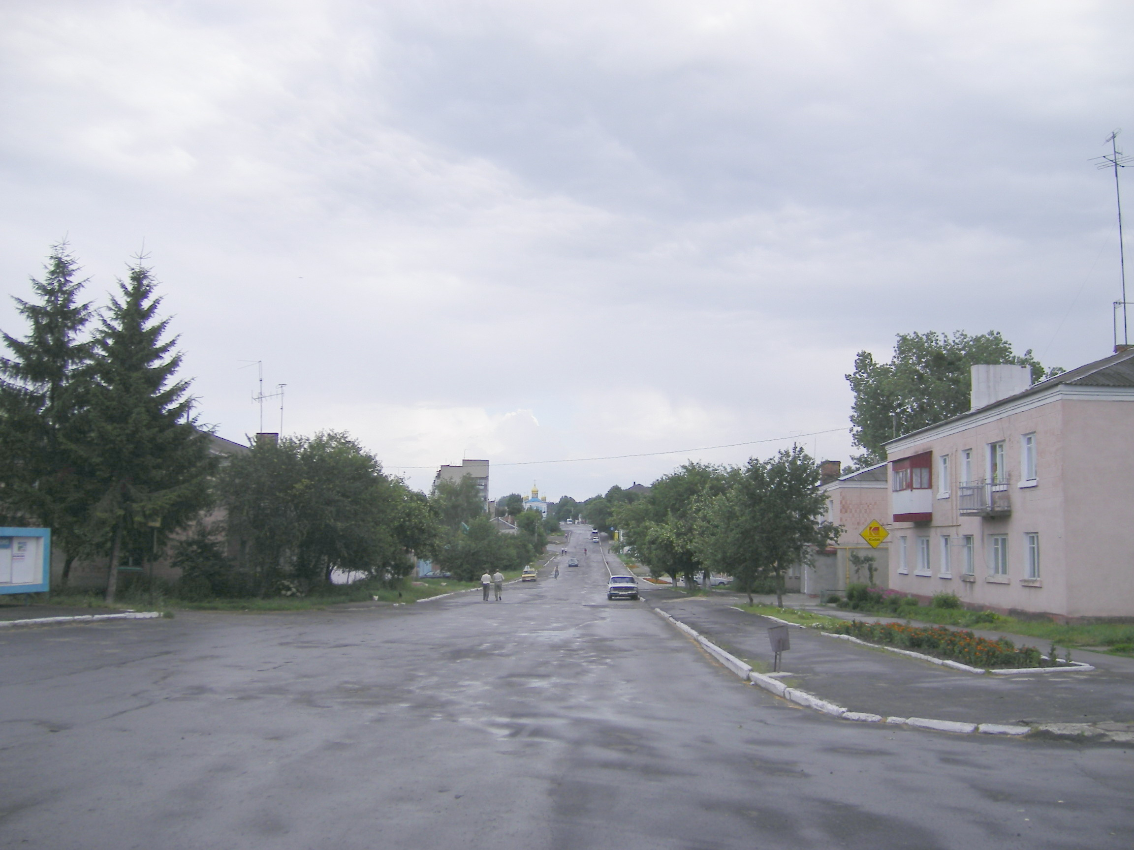 Horokhiv, Volynska Oblast